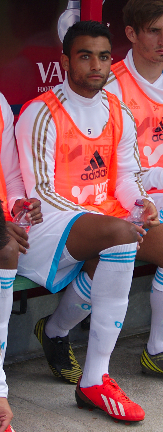 Valais Cup 2013 - OM-FC Porto - 20130713 - Banc marseillais